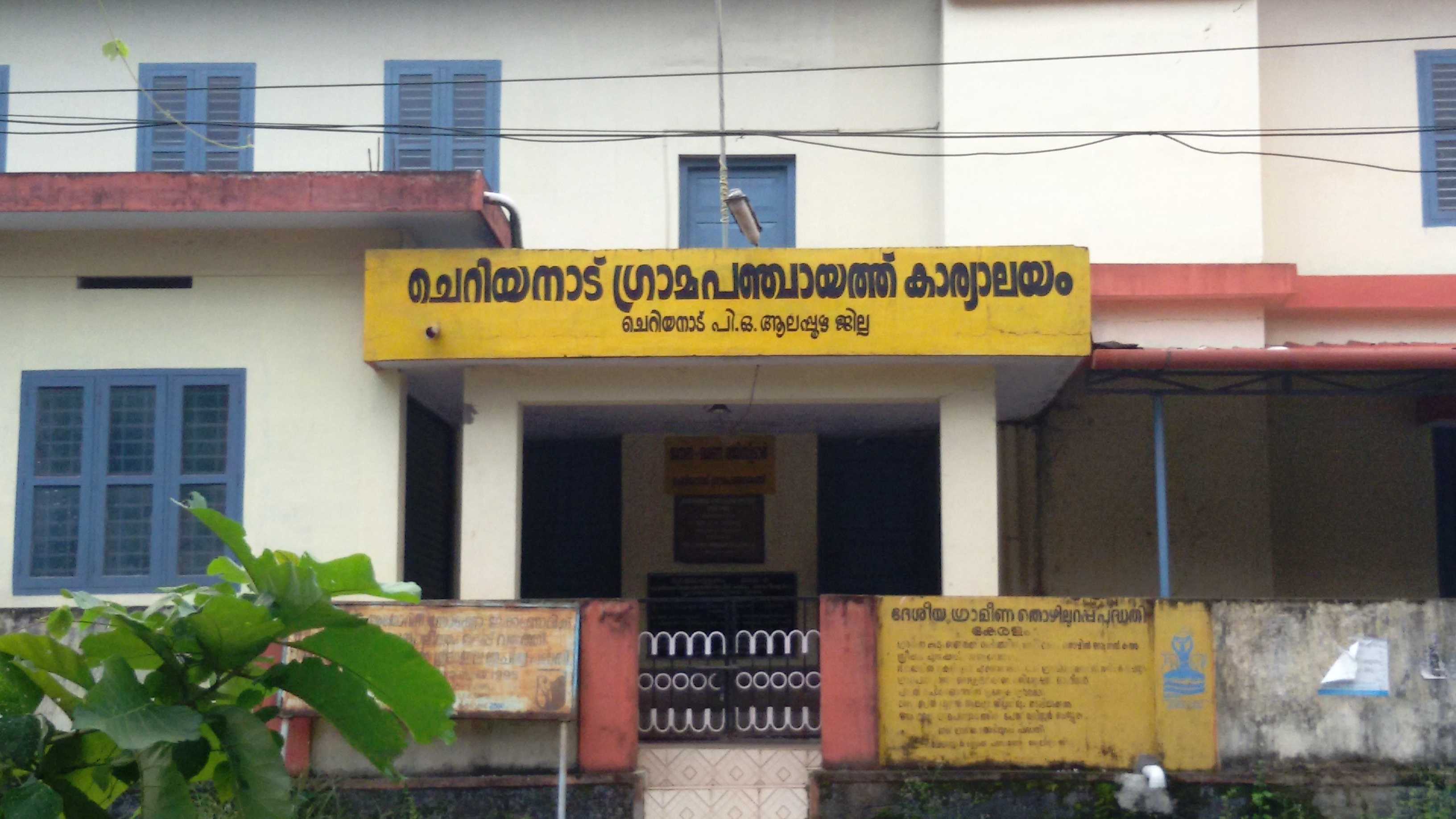 ചെറിയനാട് പഞ്ചാ‍യത്ത് കാര്യാലയം.